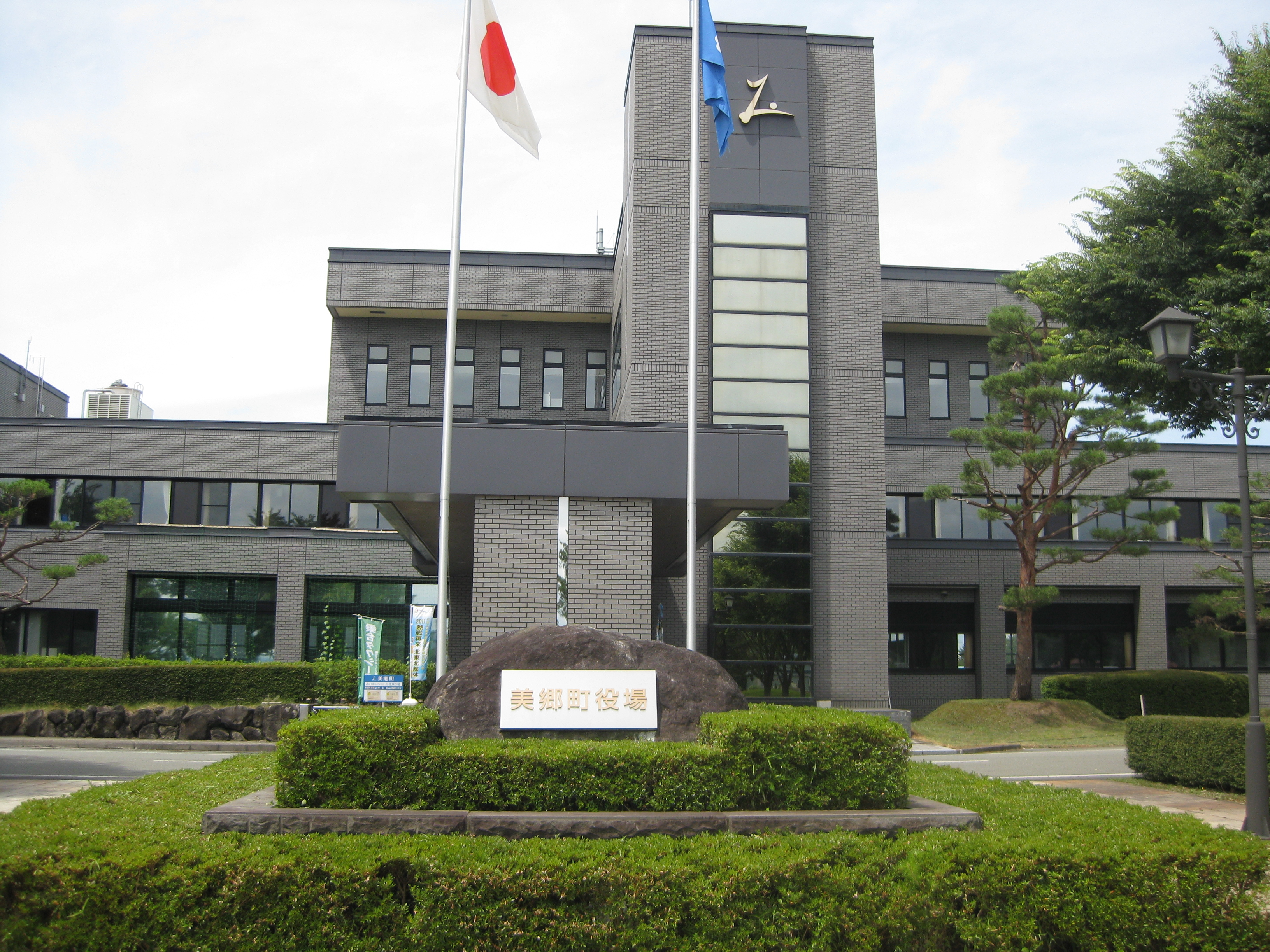 美郷町役場